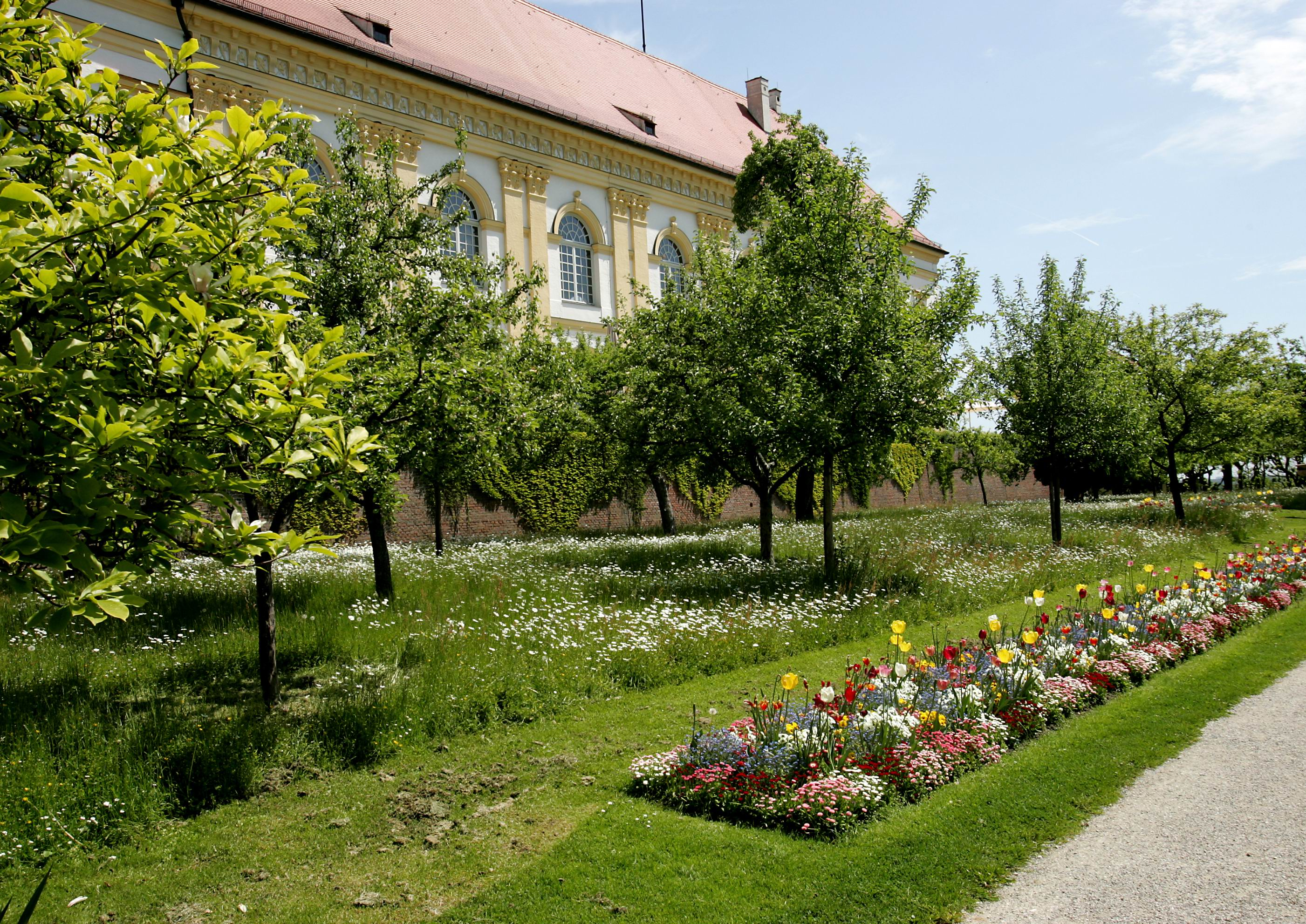 Castello di Dachau